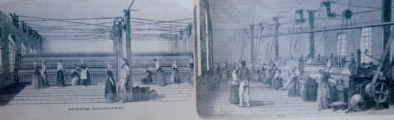 Deux gravures illustrant le travail dans la "Société Linière" de Landerneau parues dans la revue L'Illustration du 27 octobre 1849